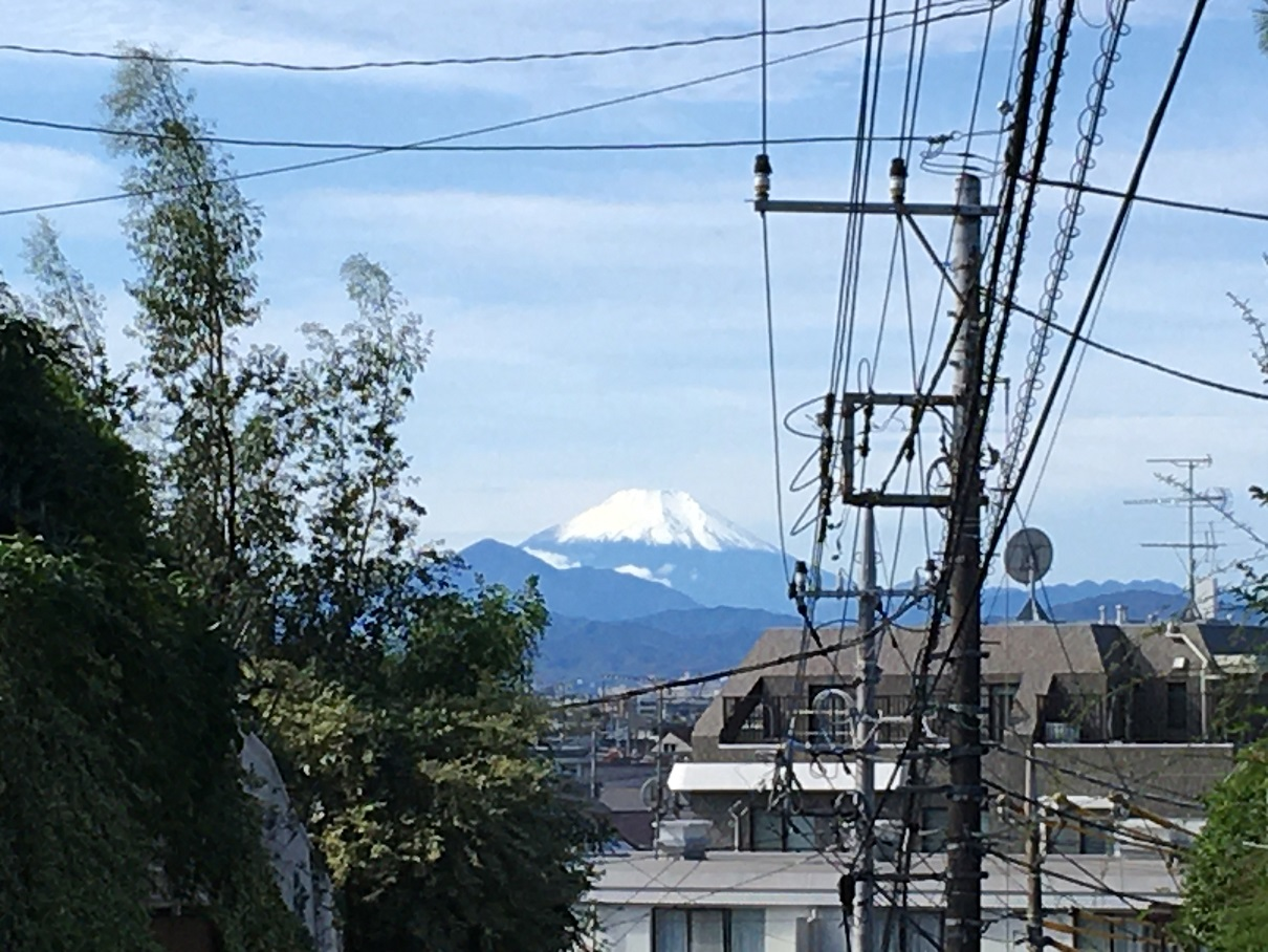 国分寺市光町1丁目から見える富士山